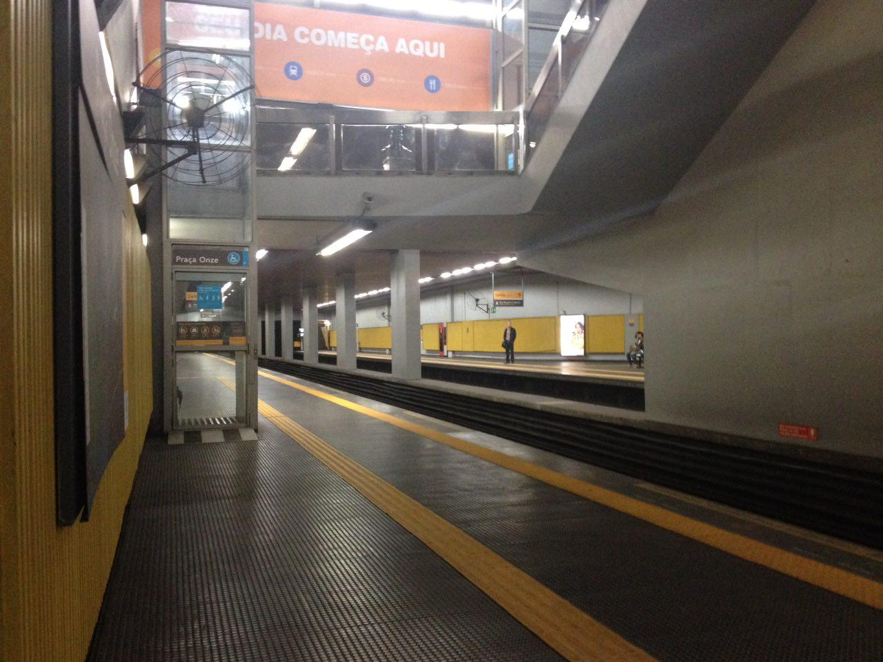 POZ_1